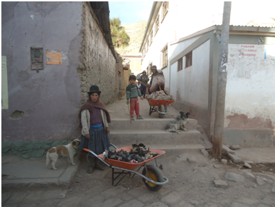 Vista de una calle de Colquechaca, municipio de Colquechaca, Provincia Chayanta, Departamento de Potosí